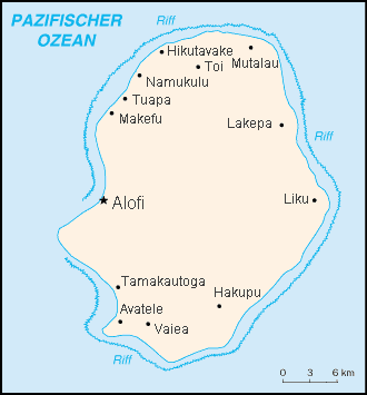 Karte der Koralleninsel Niue aus dem CIA World Factbook, Dörferergänzt